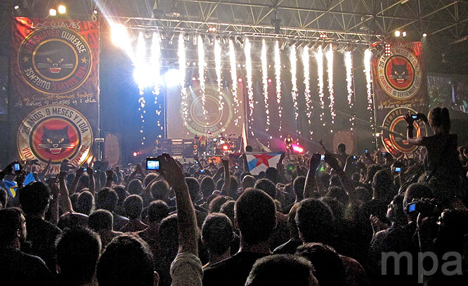 Los Suaves en su mítico concierto "29 Años, 9 Meses y 1 Dia"